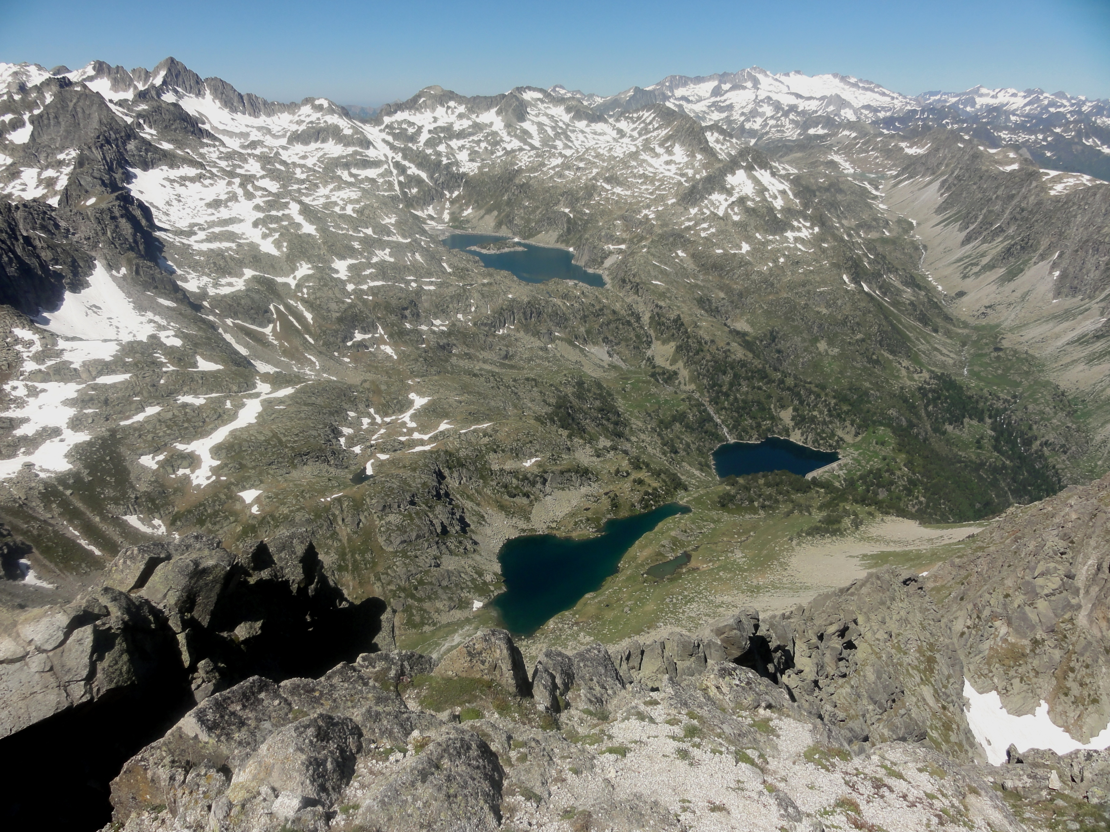 Capçalera de Valartíes This is a a photo of a natural area in Catalonia, Spain, with id: ES510081